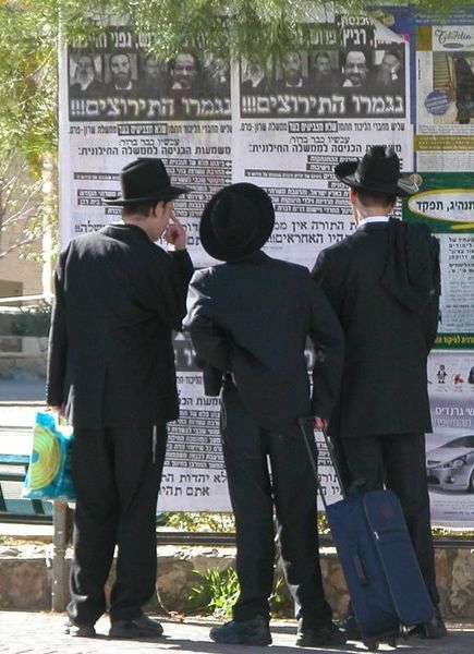 חרדים ירושלמים. צולם על ידי אפי ב.